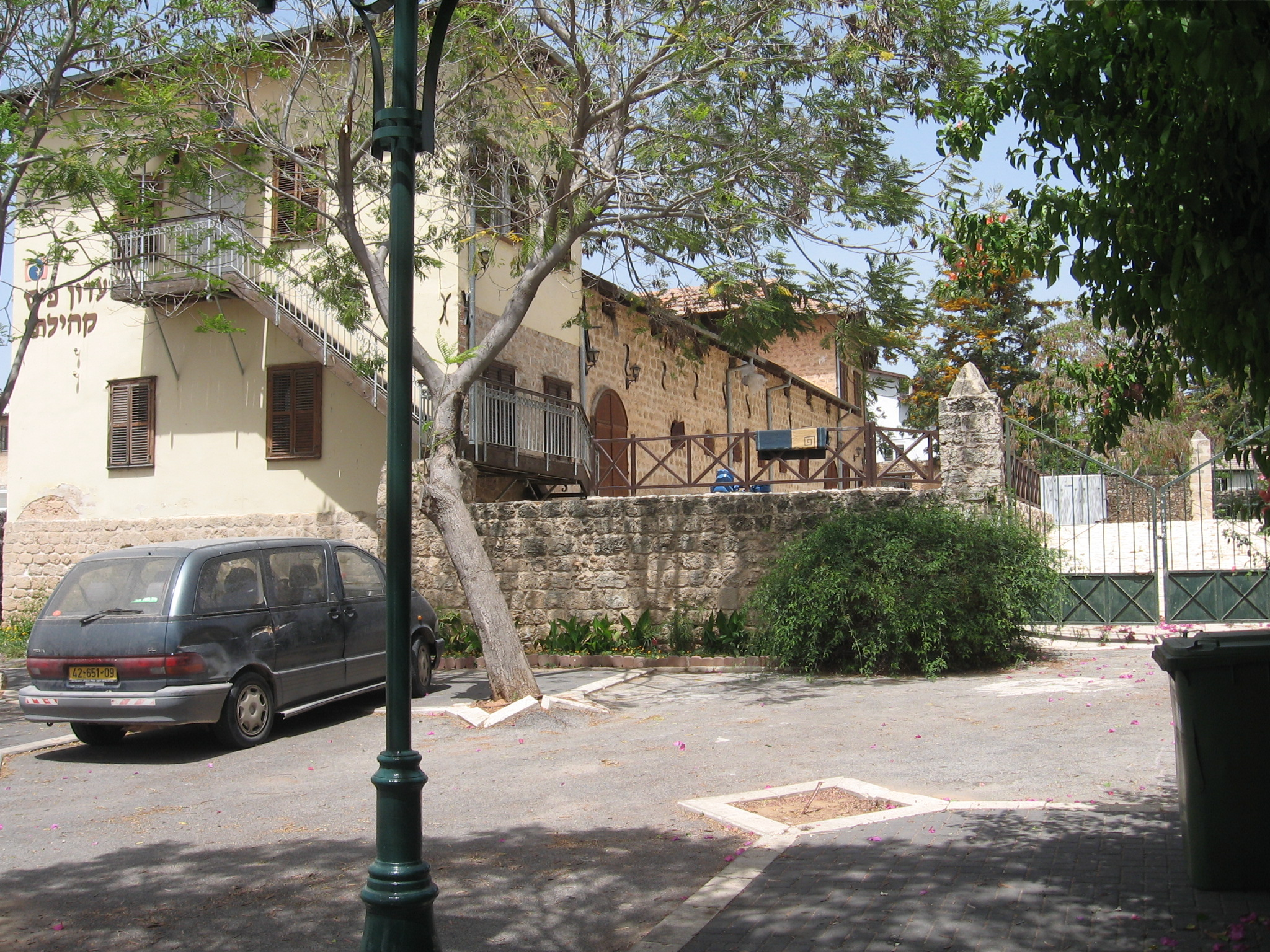 baron farm from 1892